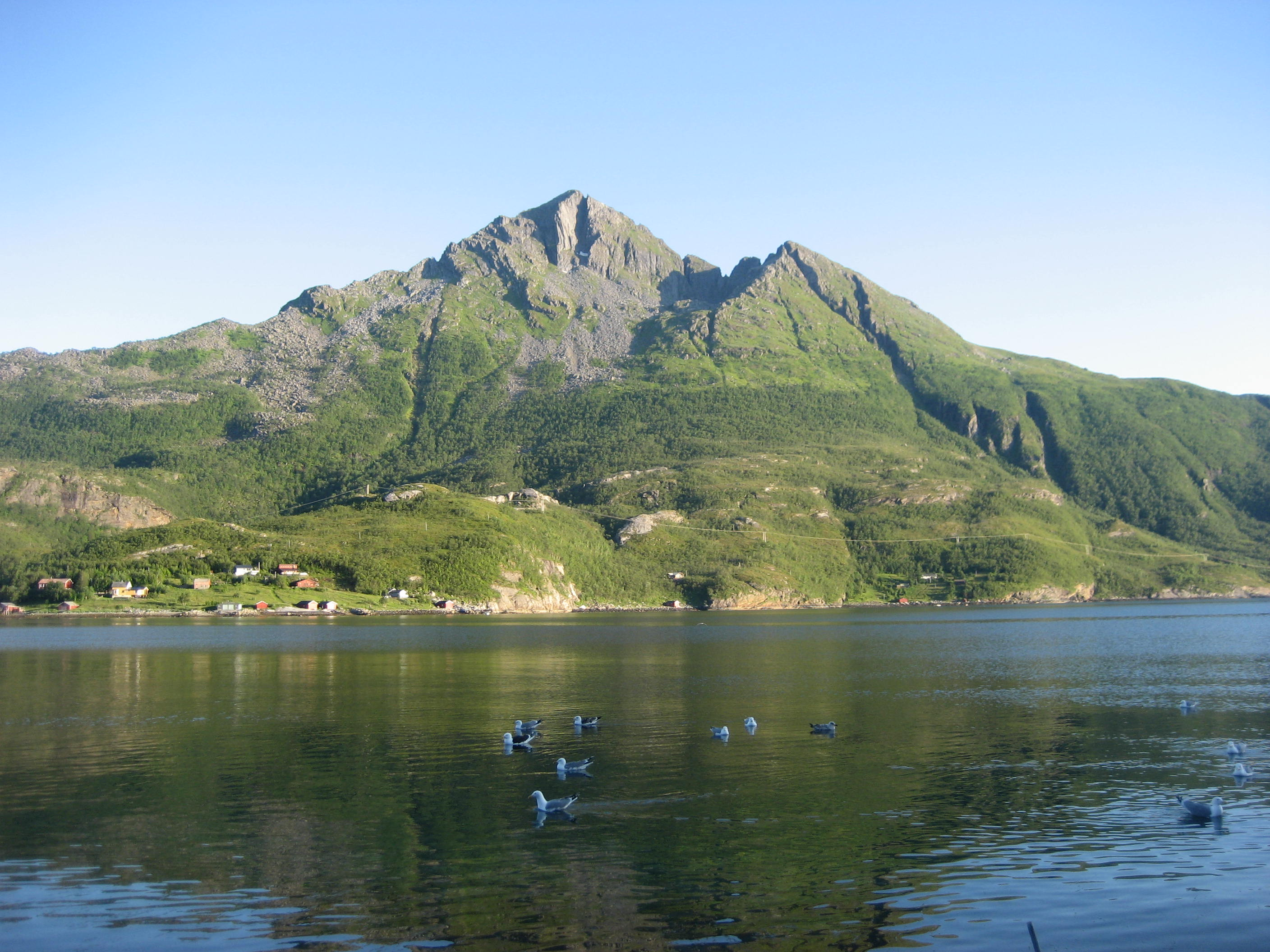 Okstinden fjell og Kvinafjord